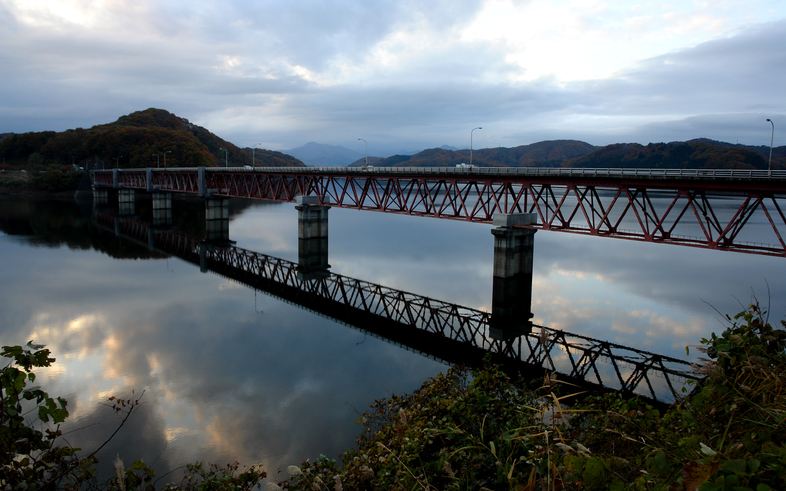 釜房湖に架かる国道286号釜房大橋